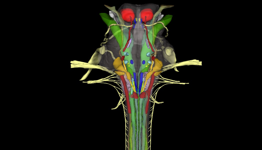 1. N. trigeminoaren nukleo eragilea